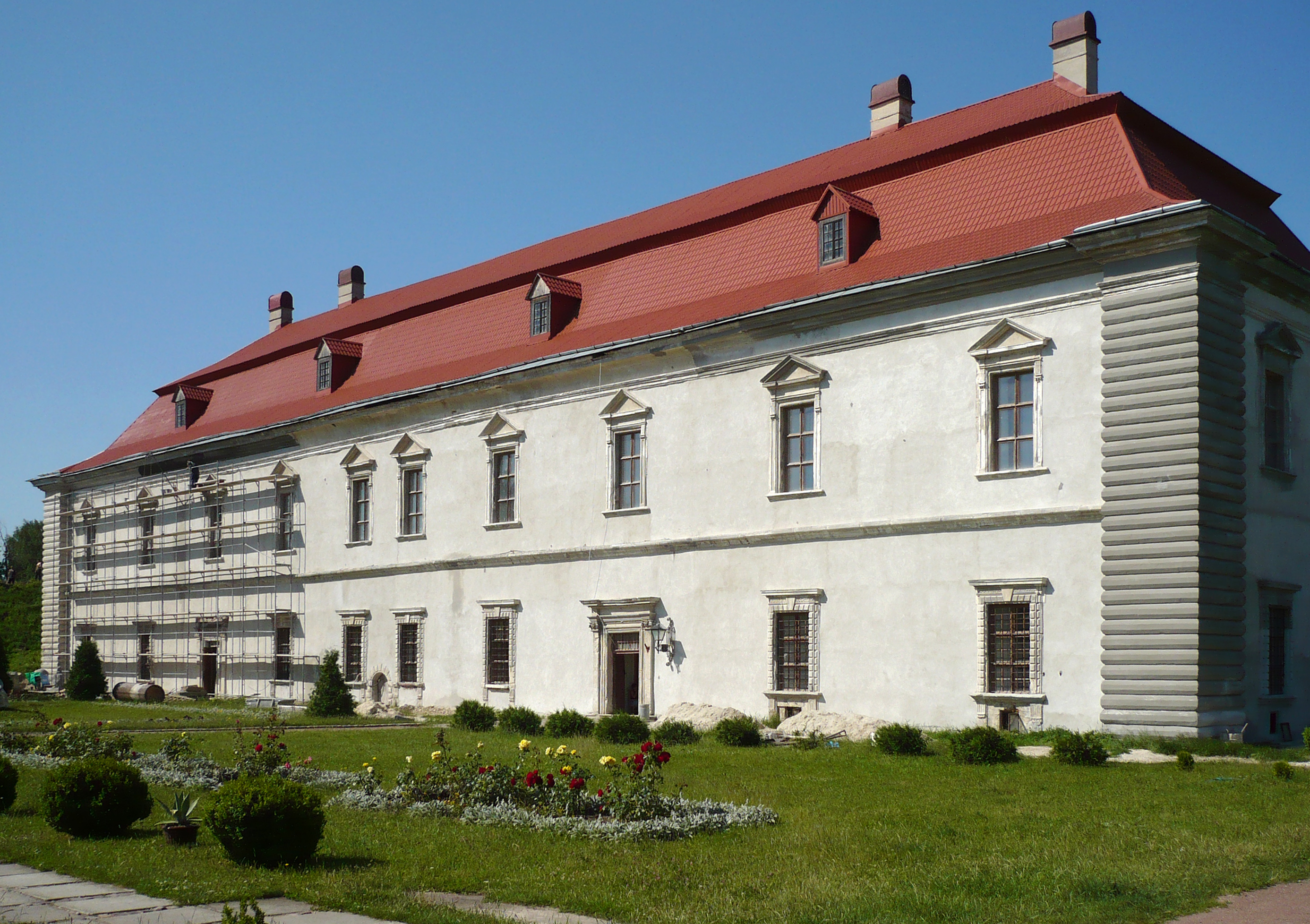 Pałac na dziedzińcu zamku w Złoczowie